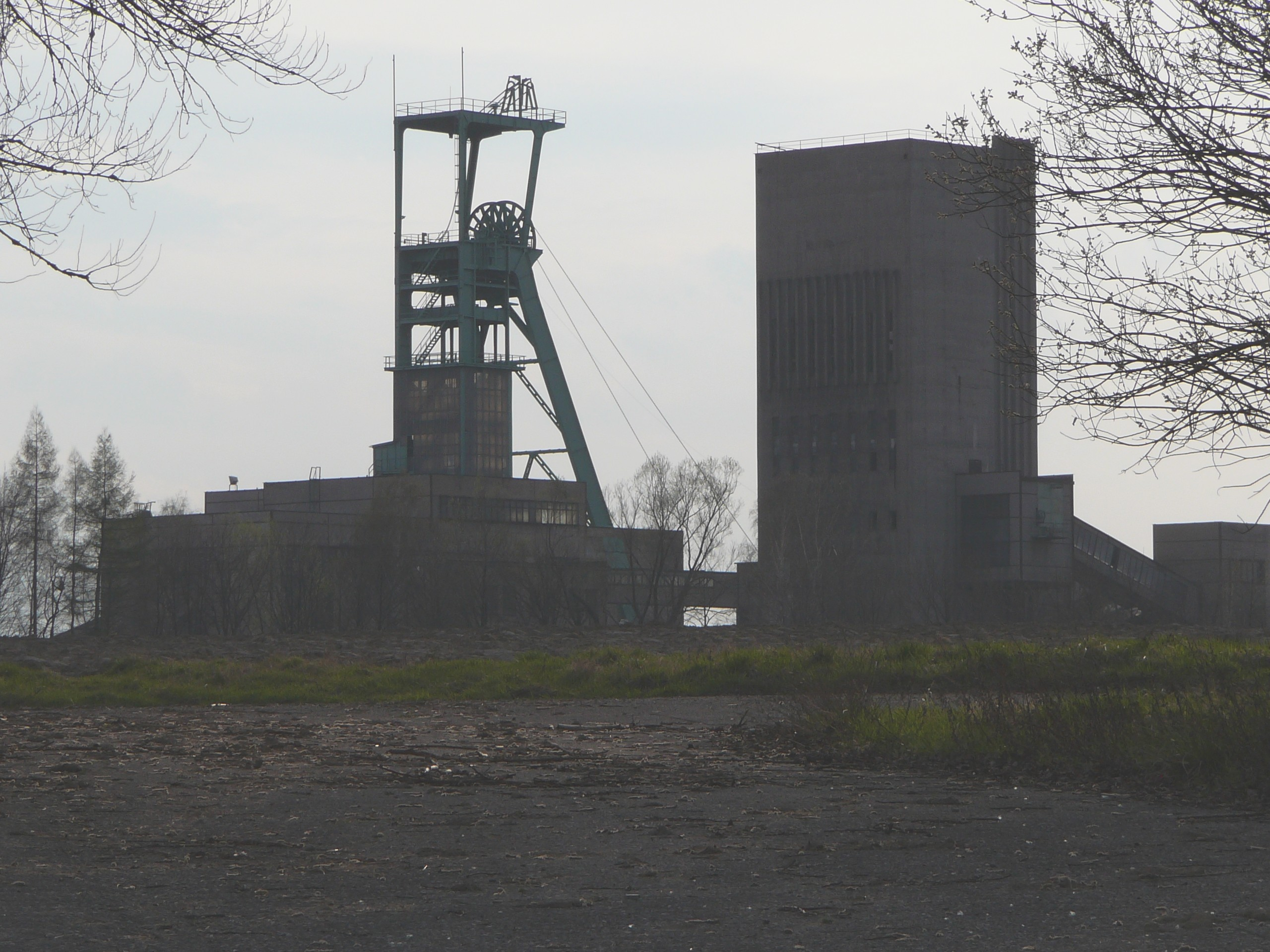 Těžní a skipová věž dolu ČSM - jih